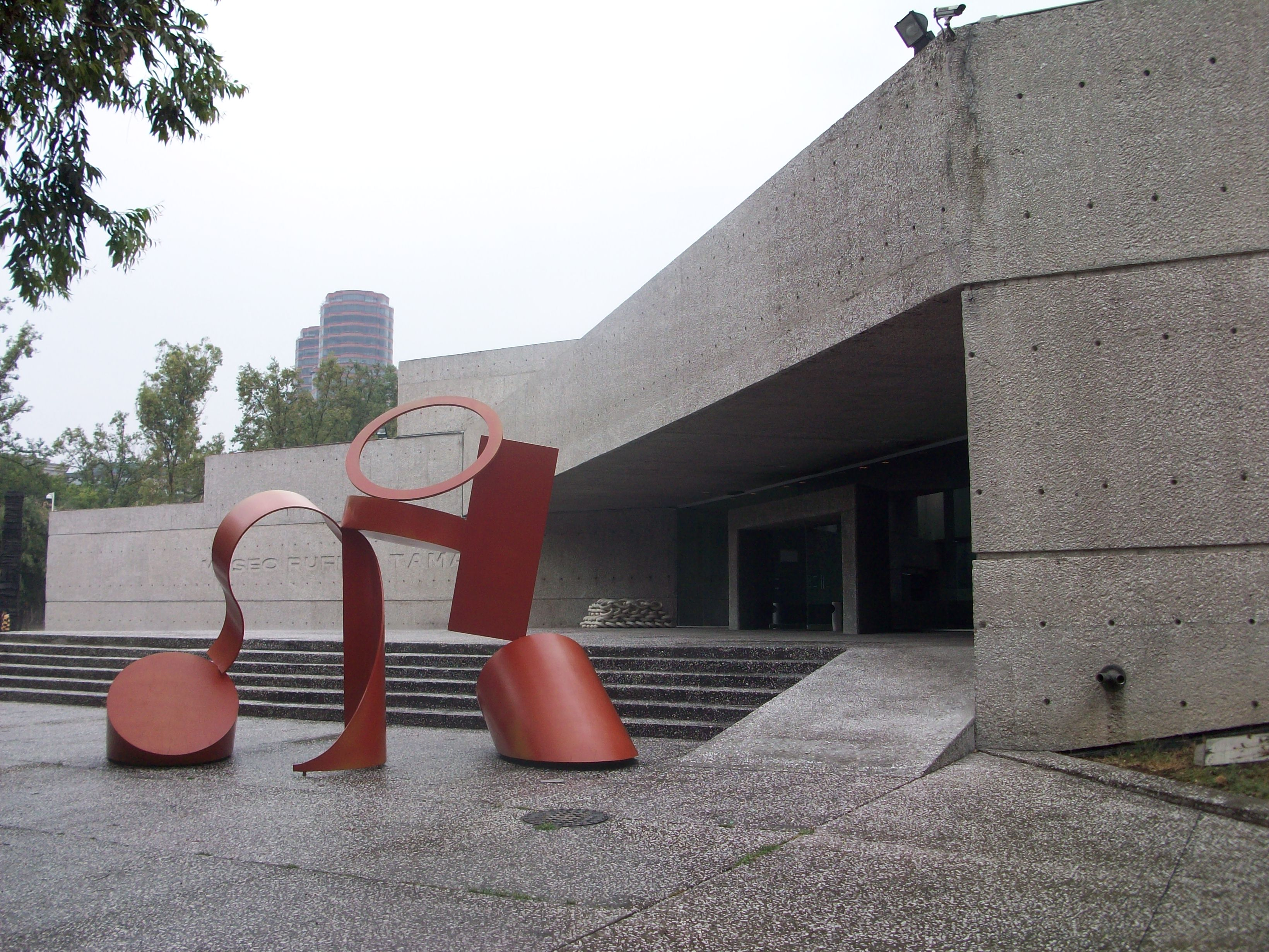 Museo Rufino Tamayo